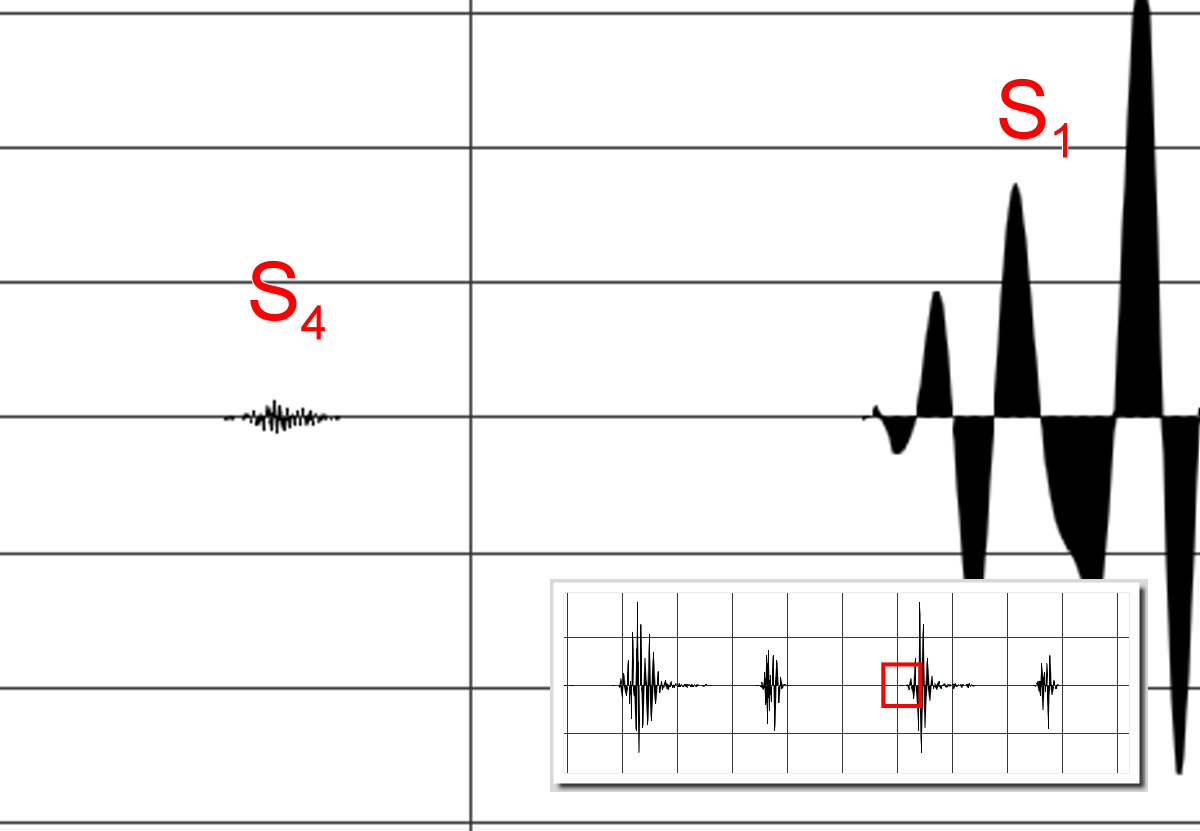 第四心音的波形